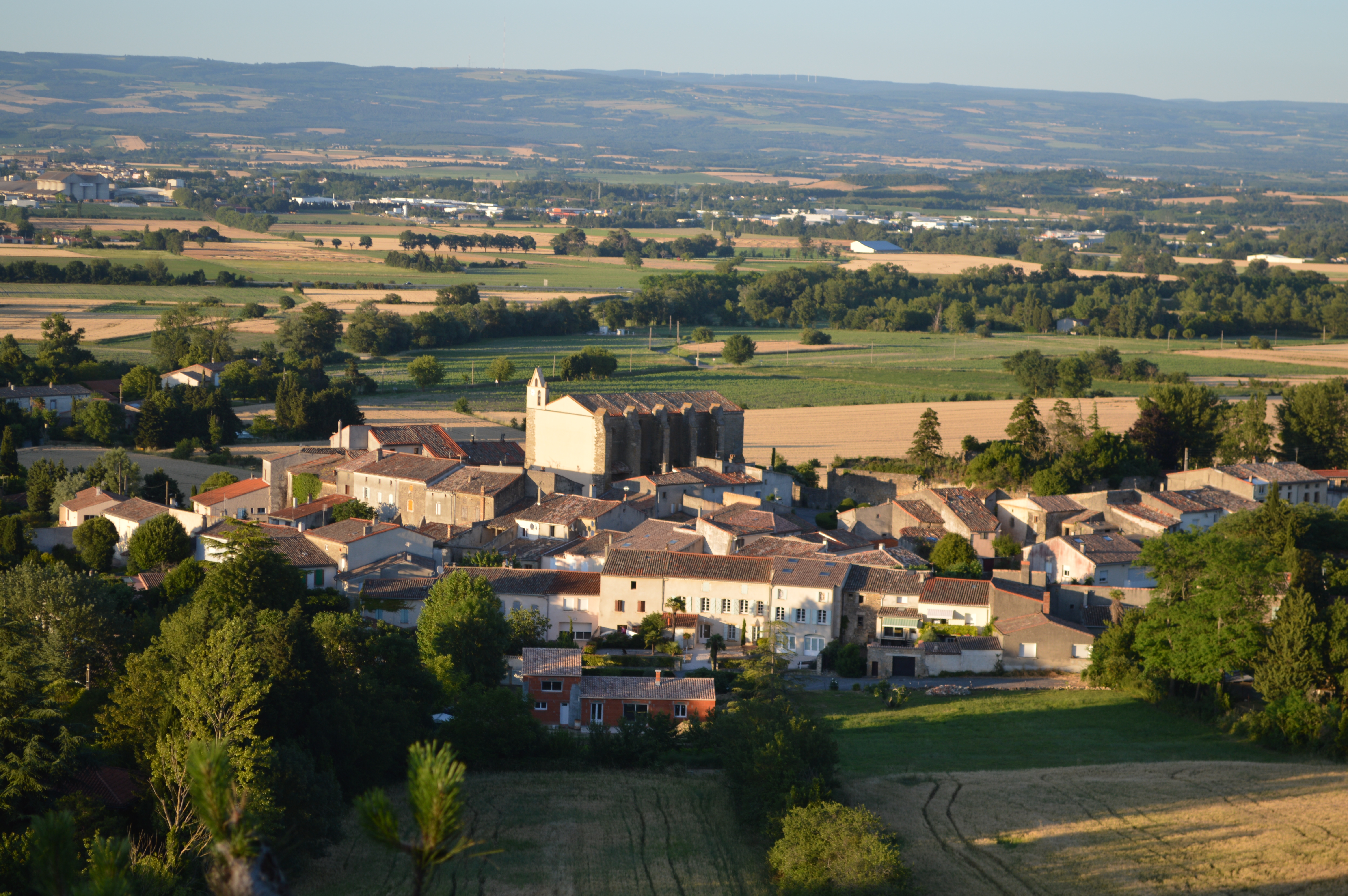 Village vue des collines en fin d'après midi.